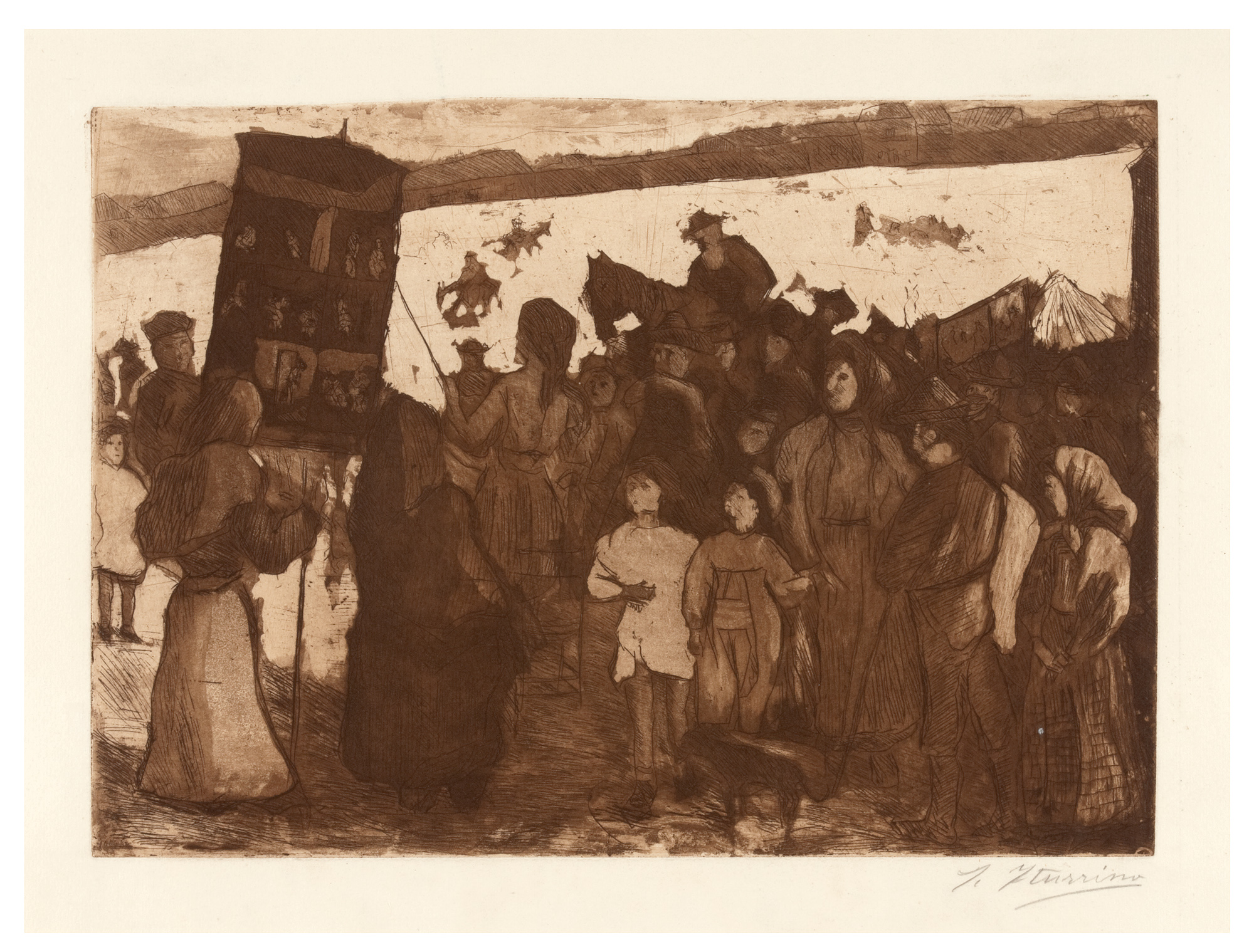 La cantante de las muchedumbres (c. 1910), de Francisco Iturrino, aguafuerte, 24,5 x 34,5 cm, Colección Gelonch Viladegut.